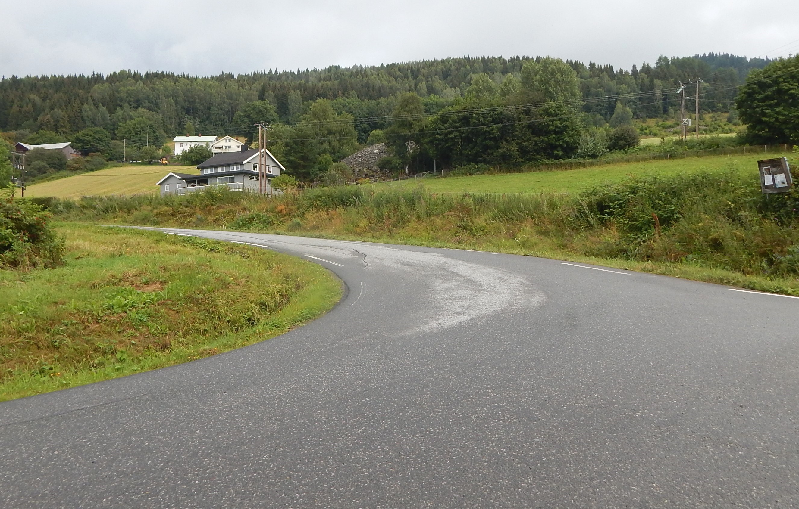 Sørøstenden av Nordre Ringsveg (FV1672, tidl. 15)